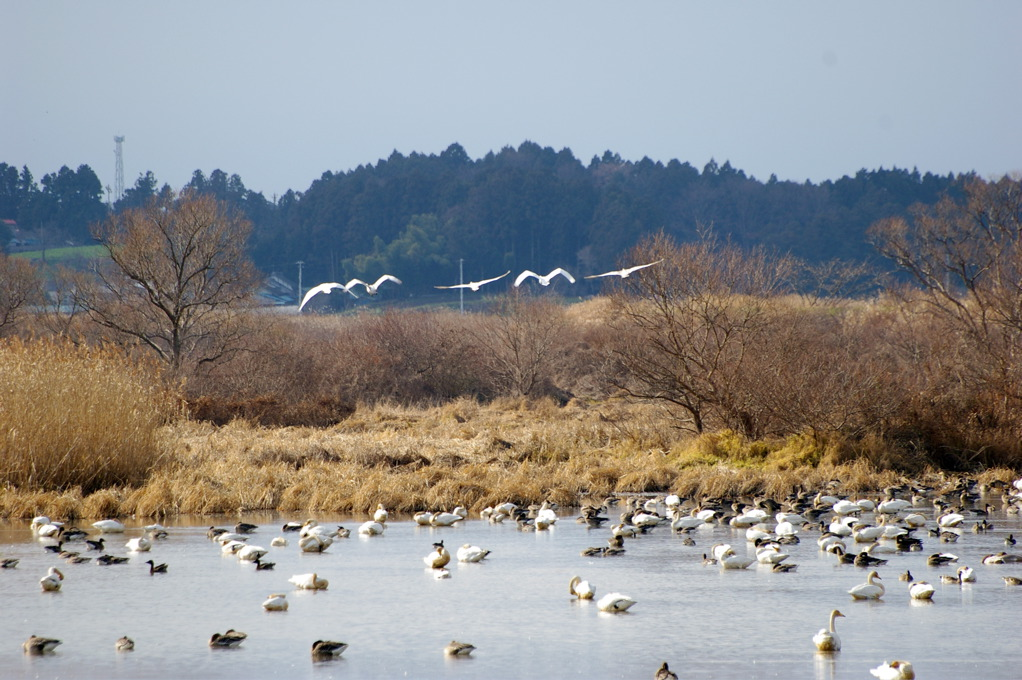 Kabukurinuma, a pond in Osaki, where many bird pass winter